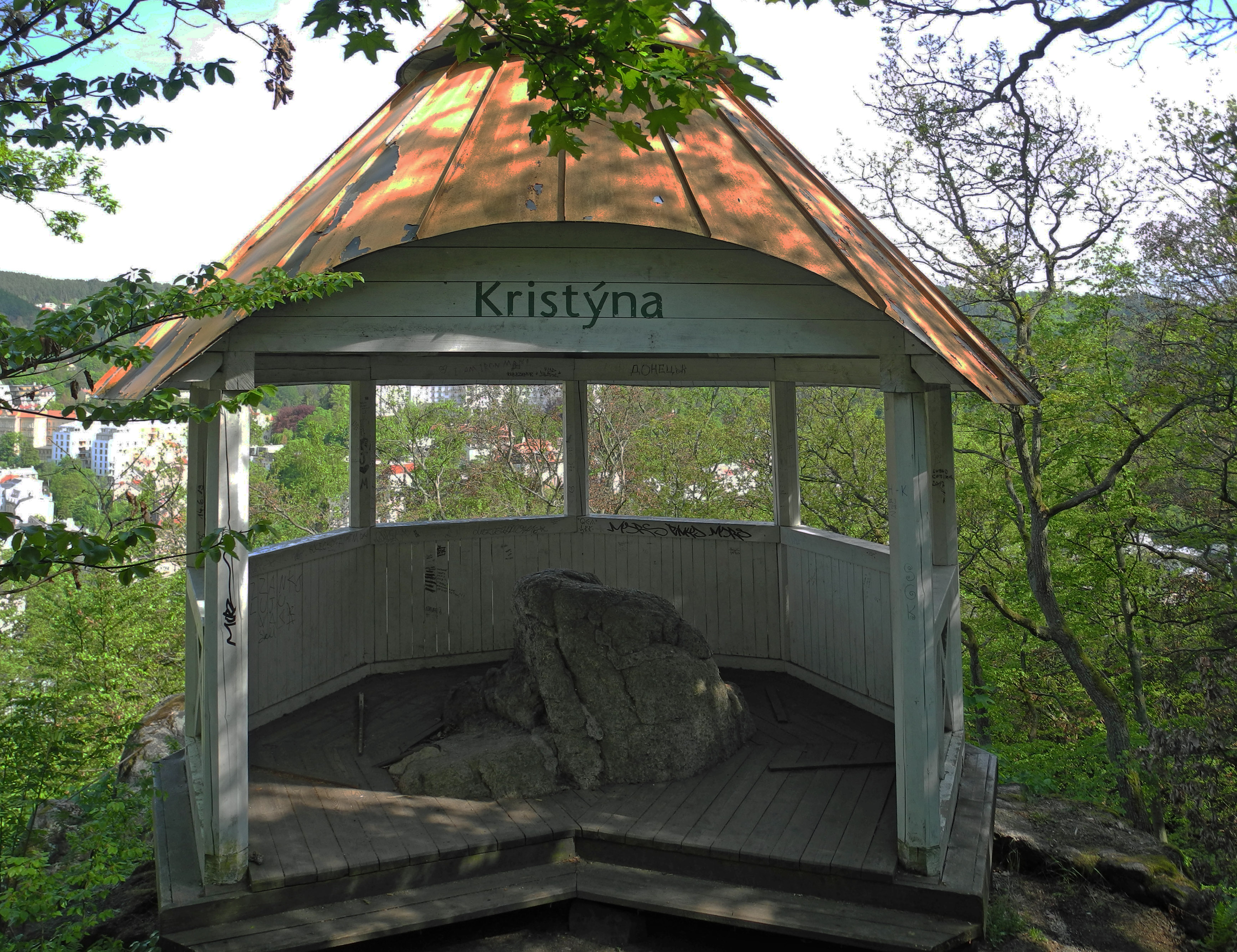 Pavillon Kristýna im Stadtwald von Karlsbad (Karlovy Vary)